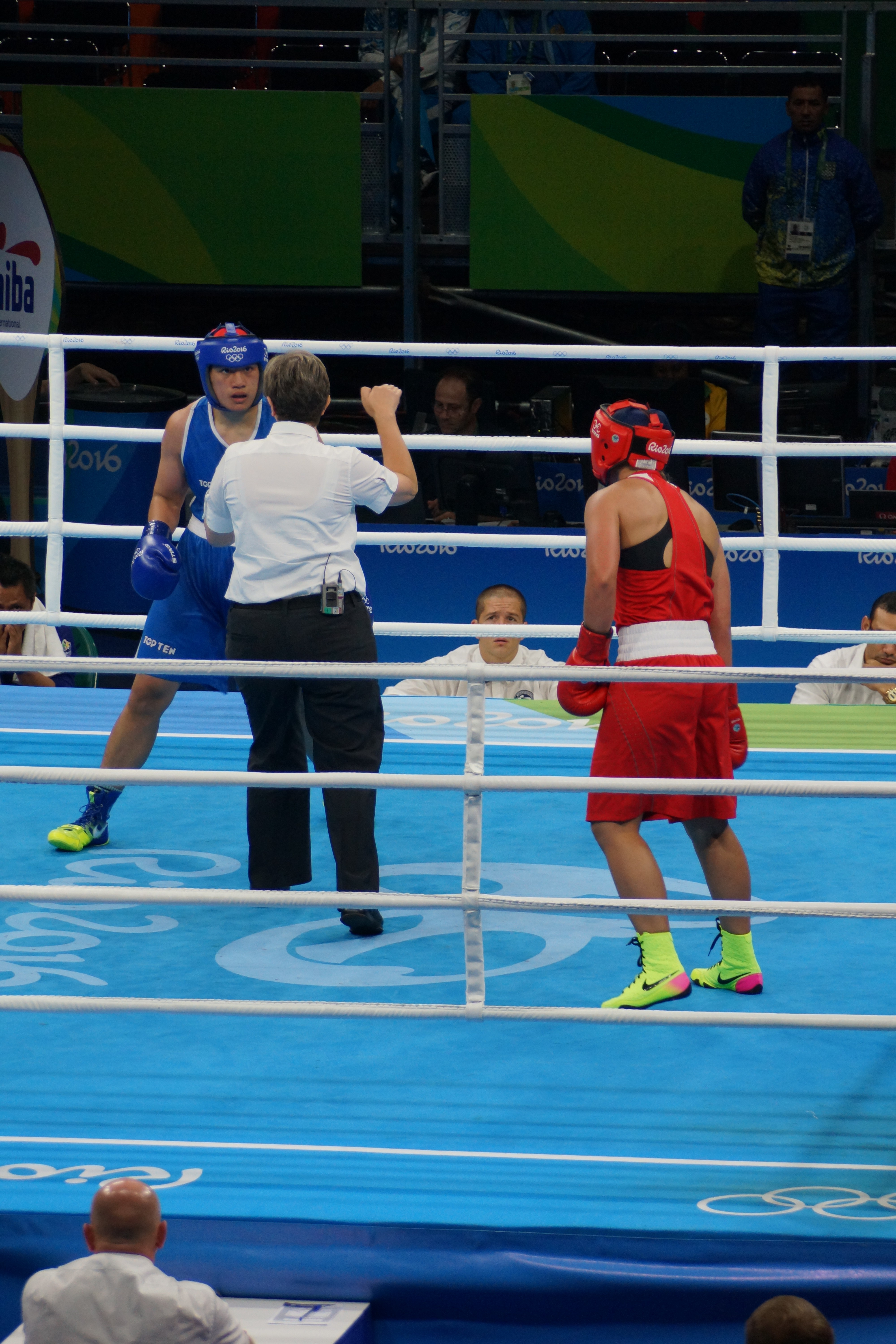 slt.a-77